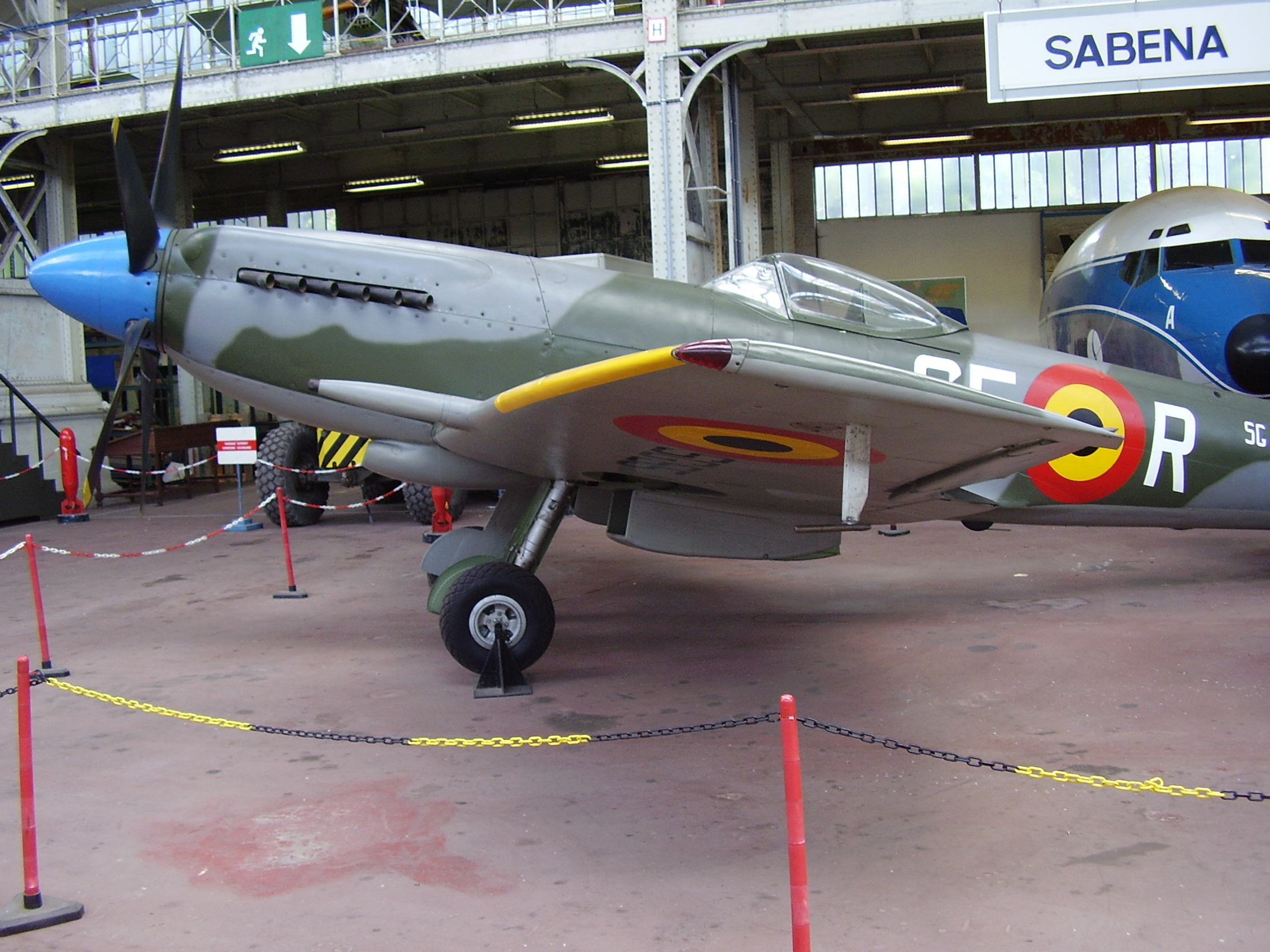 Royal Military Museum Brussels, Musée Royal de l'Armée, Koninklijk Museum van het Leger en de Krijgsgeschiedenis